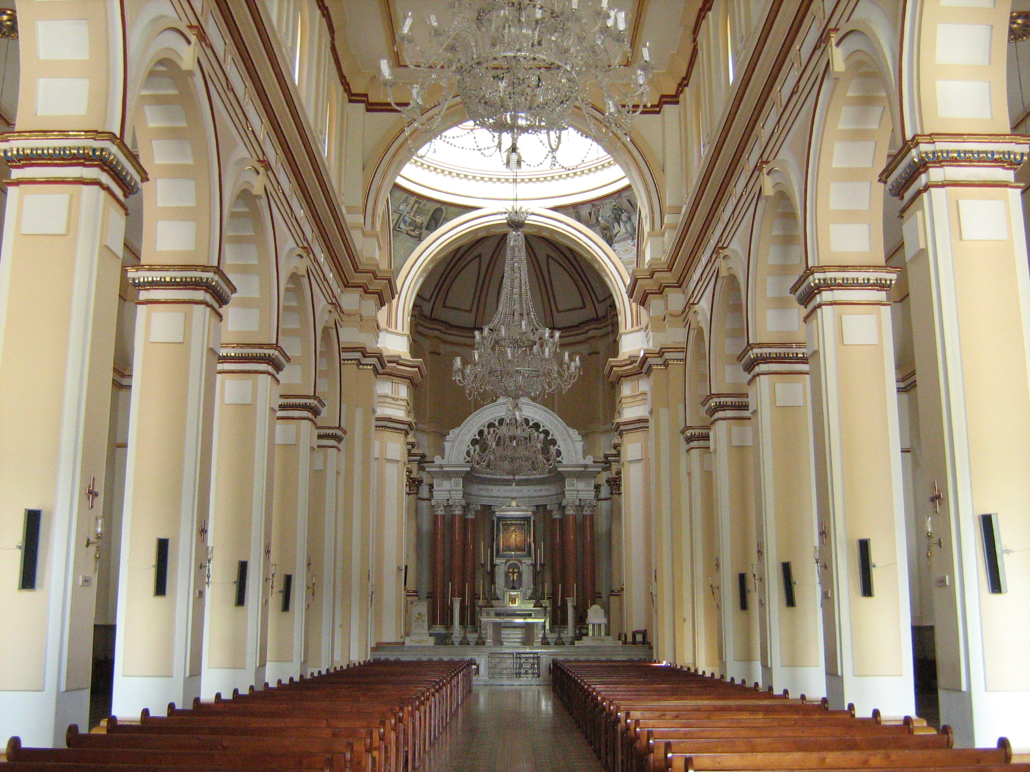 Neve Central de la Basílica de Yarumal. Antioquia, Colombia.